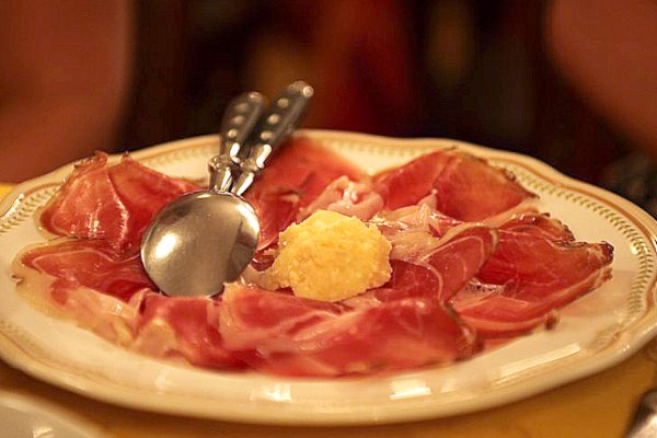 culatello, trattoria gigina's, bologna